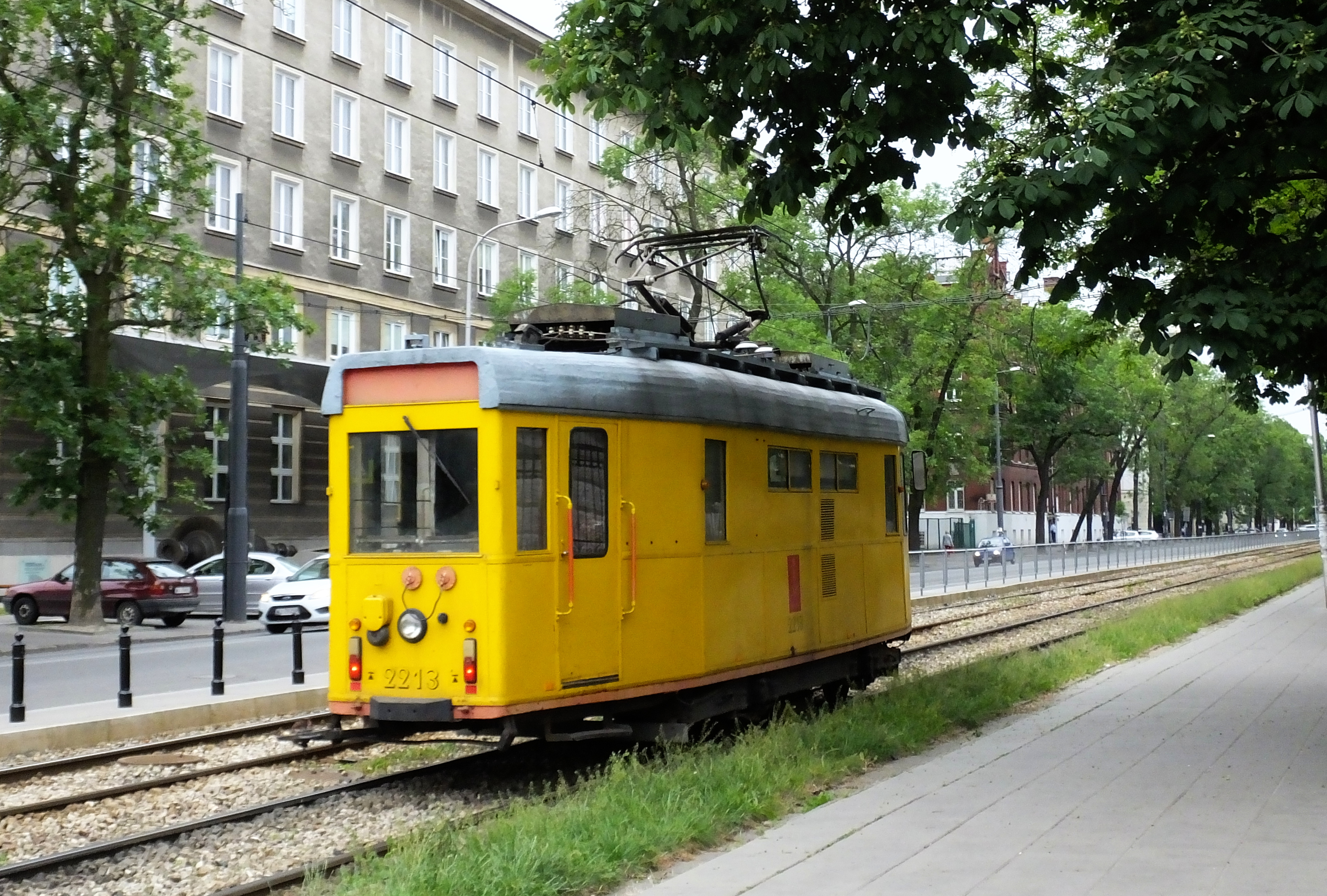 Warszawski tramwaj gospodarczy numer 2213, wagon typu K z połowy lat 50. XX w.